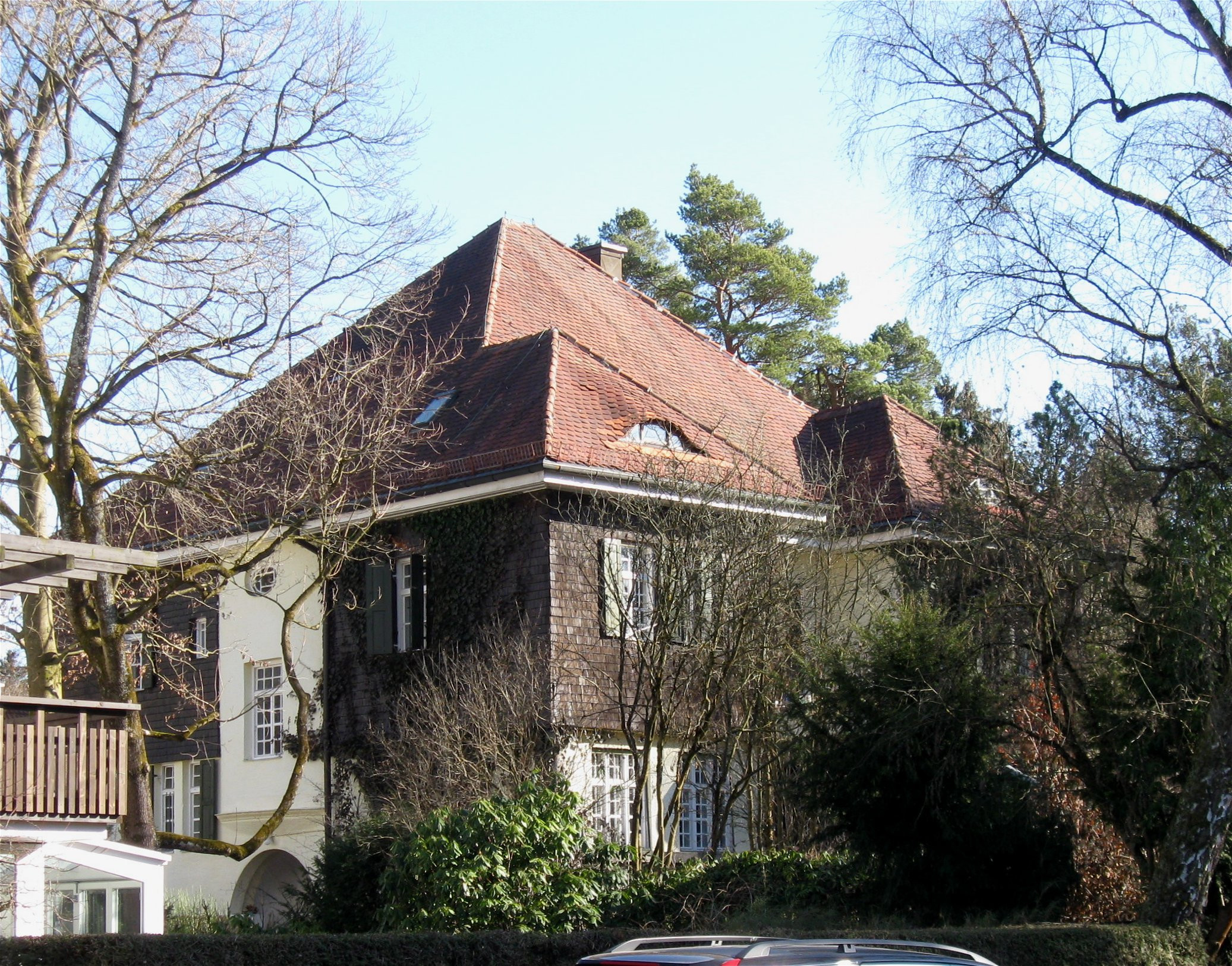 Harthauser Straße 117; Villa, historisierend, Architect Ernst Günther, 1913